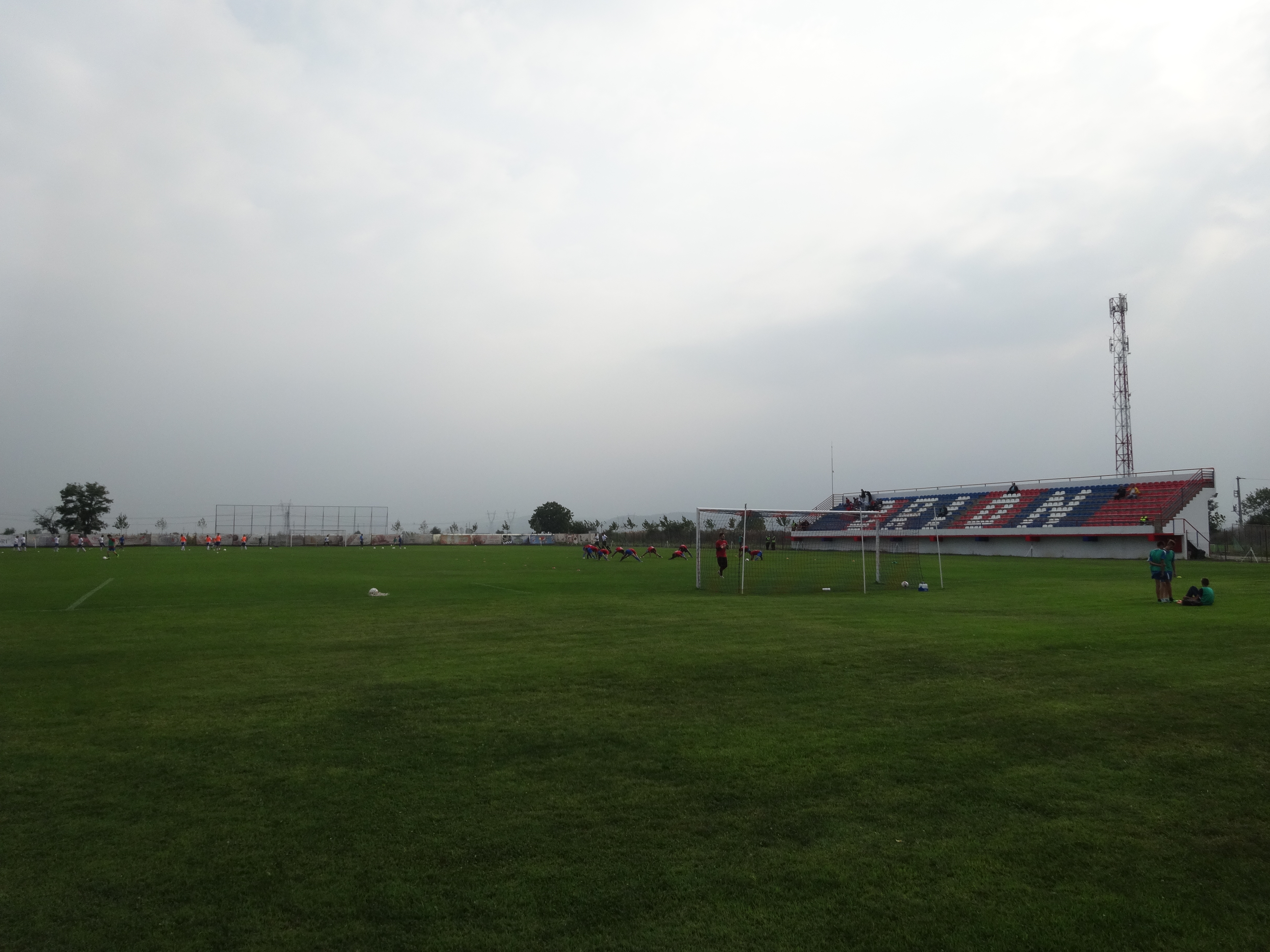 Mrštane, Leskovac